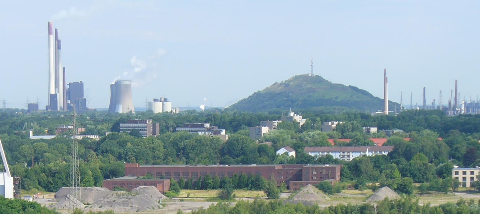 Halde Oberscholven in Gelsenkirchen von der Halde Rungenberg aus gesehen. Im Vordergrund die stillgelegte Zeche Hugo